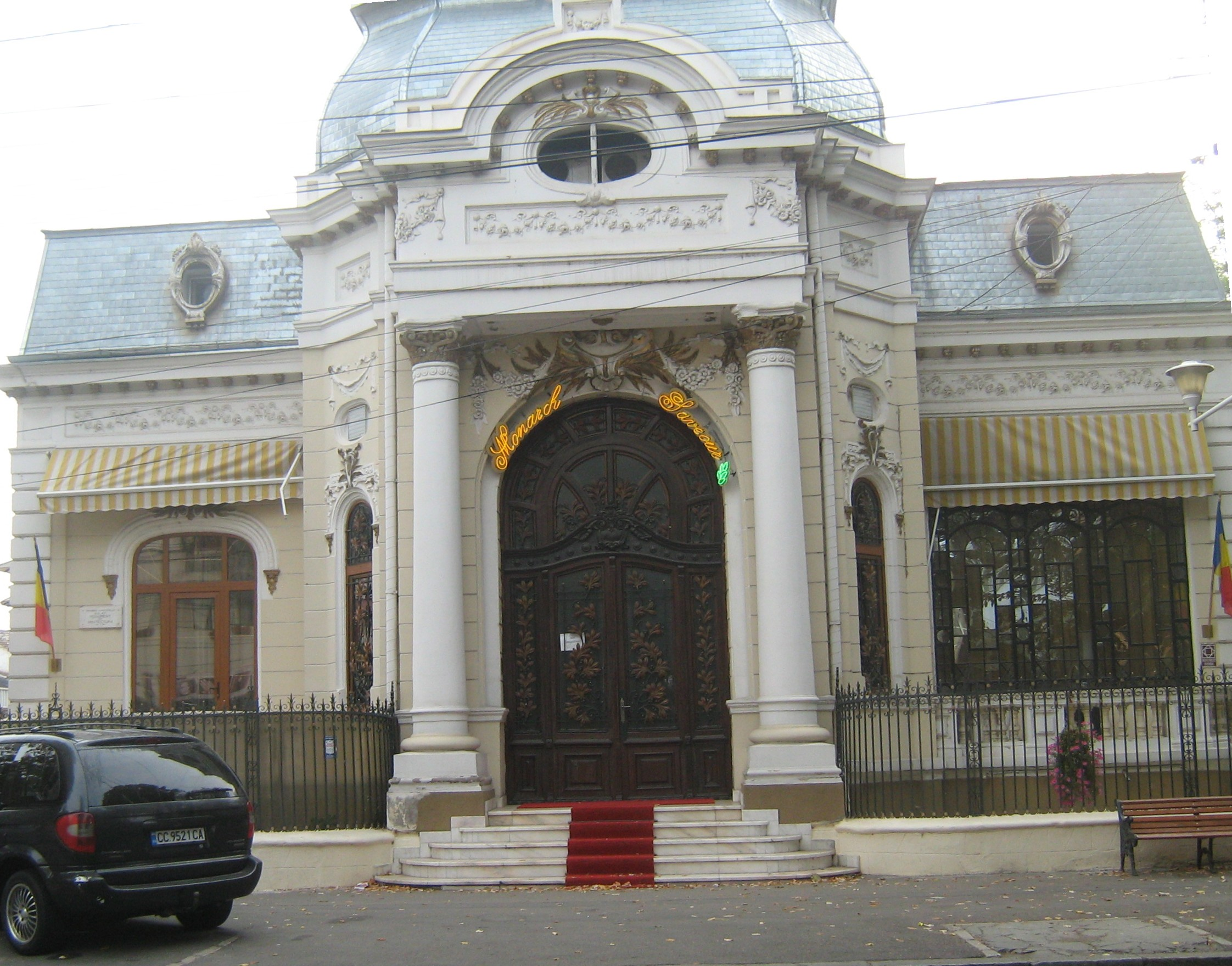 Galati, Casa Auschnitt fostul Consulat italian